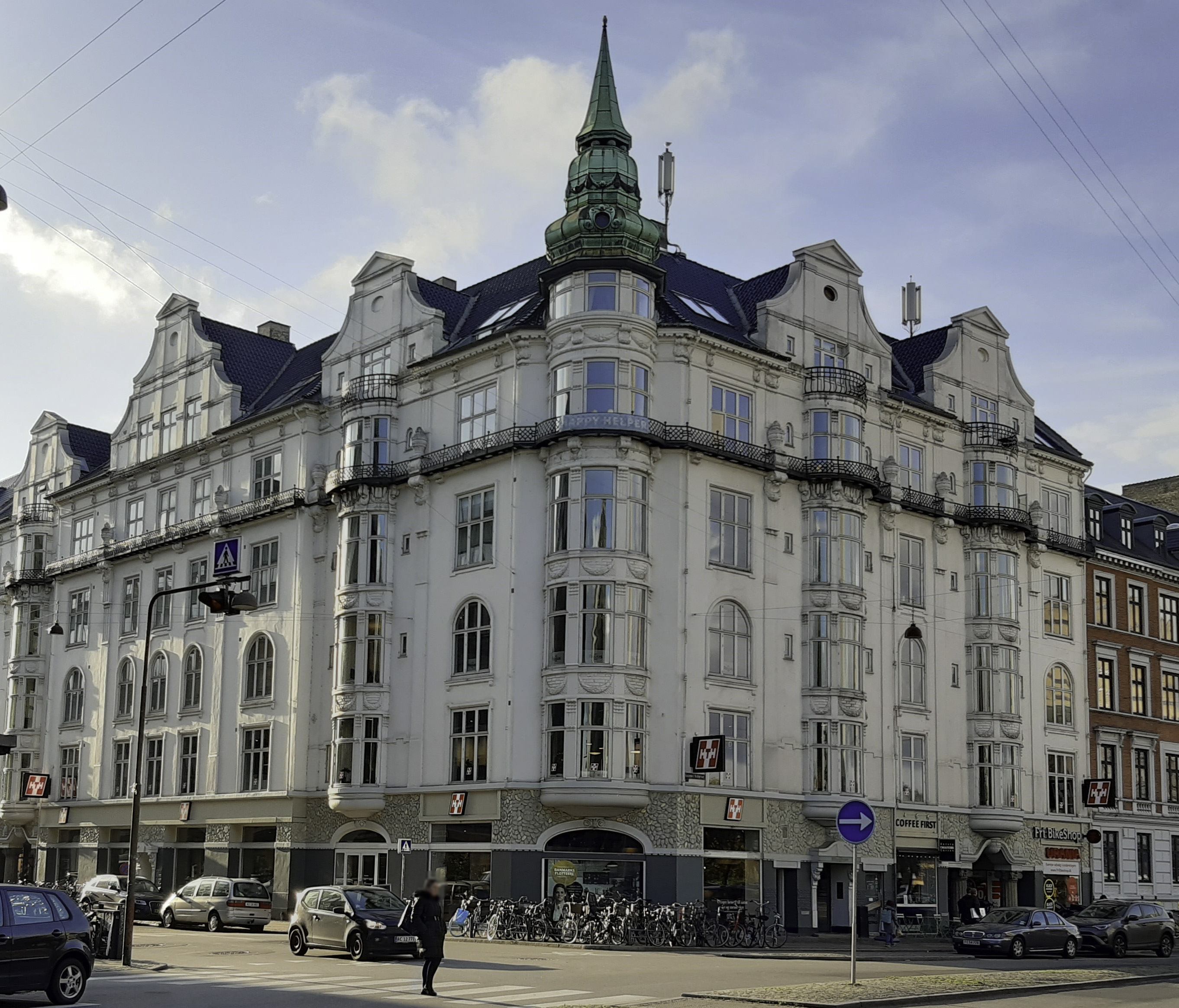 I hjørneejendommens stueplan lå Johannes Lindes forretning "Byens Bohave"